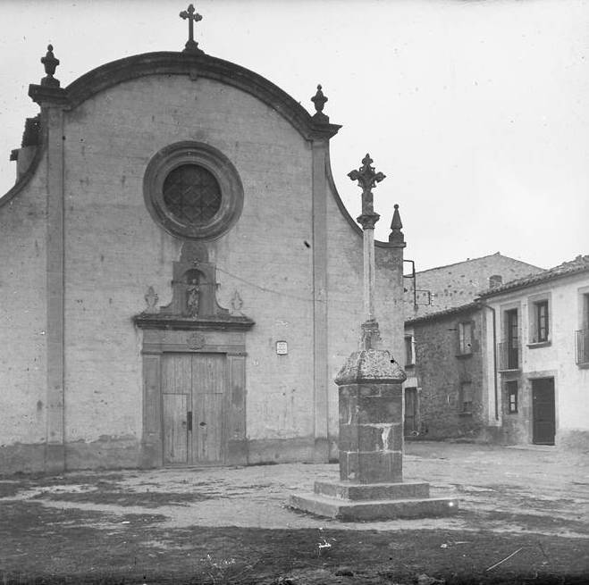 Creu de Sant Francesc a Castellterçol. Josep Salvany i Blanch (1917)